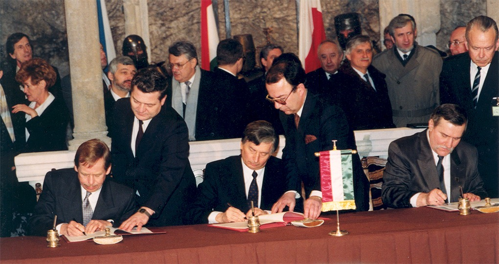 Podpisovanie zmluvy Vyšehradskej skupiny vo februári 1991